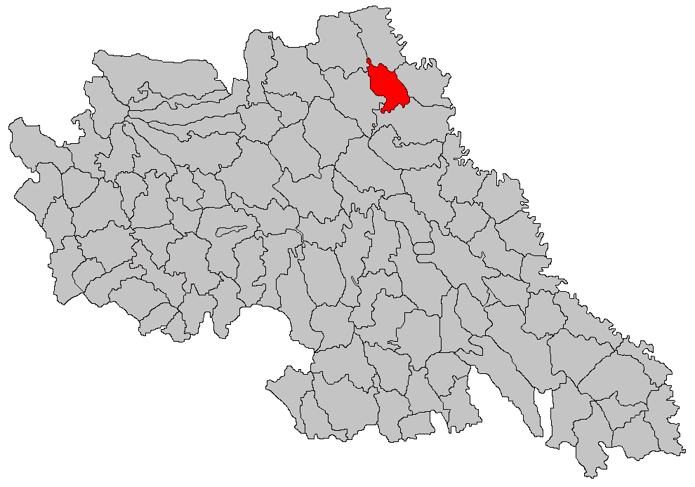 Categorie:Hărţi ale judeţului Iaşi